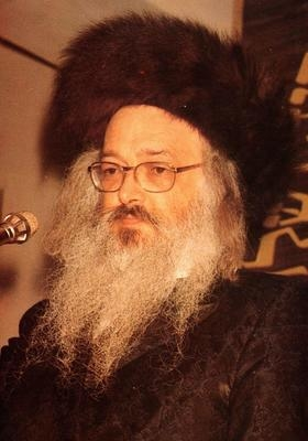 רבי ישראל משה דושינסקי, גאב"ד העדה החרדית והאדמו"ר מדושינסקיא